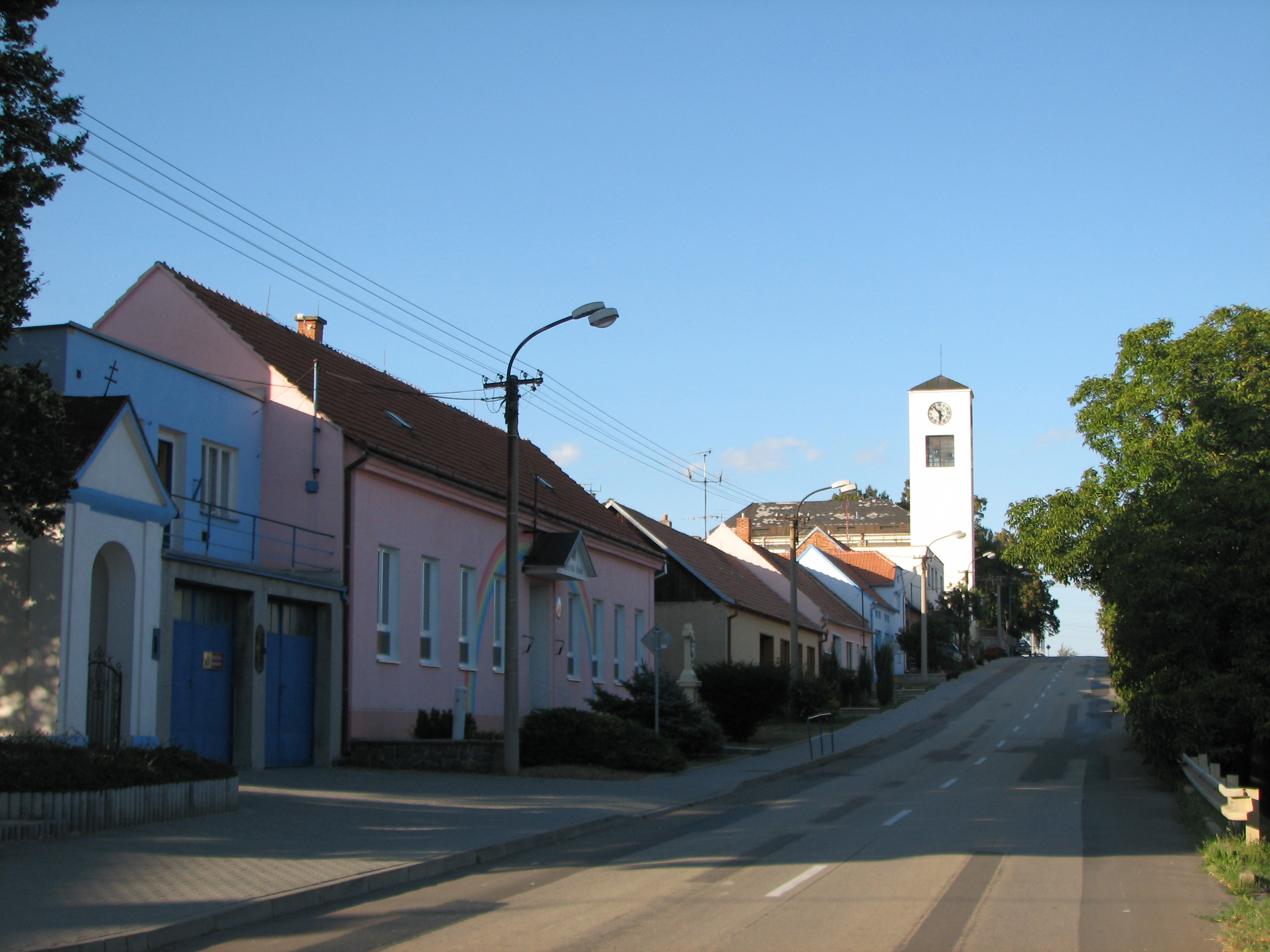 Násedlovice - hlavní ulice s kostelem